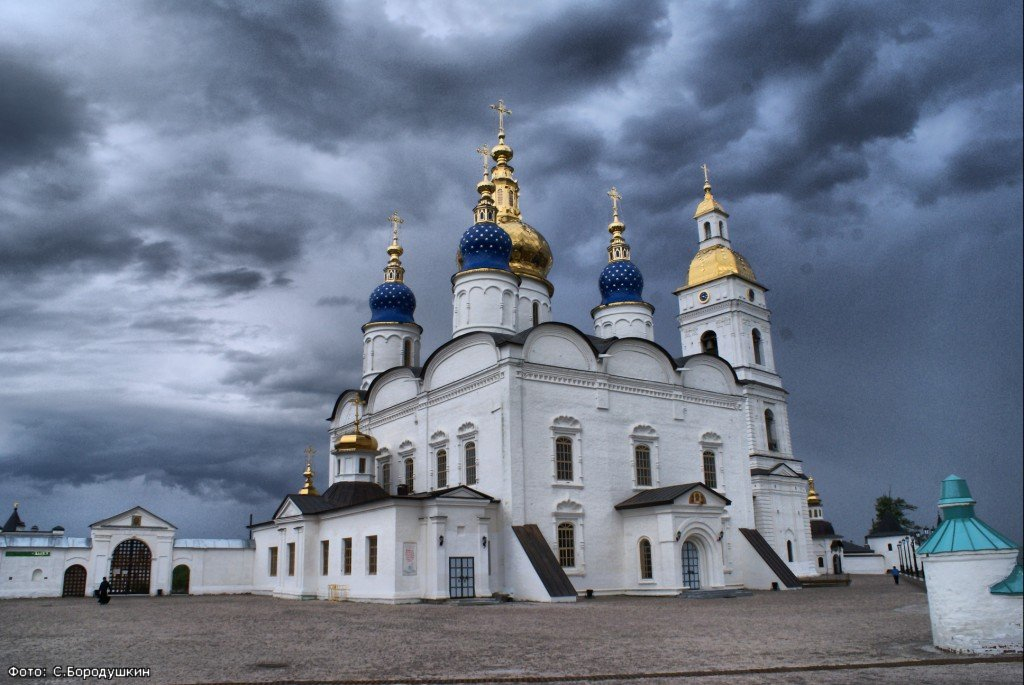 Софийско-Успенский собор в городе Тобольске.